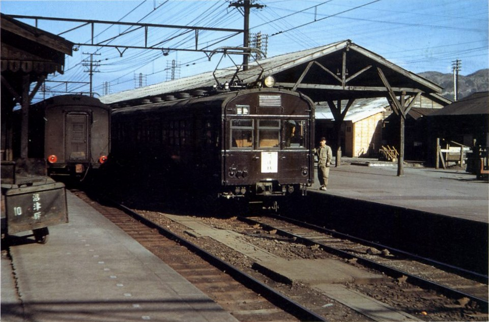 沼津駅でのモハ63形電車。